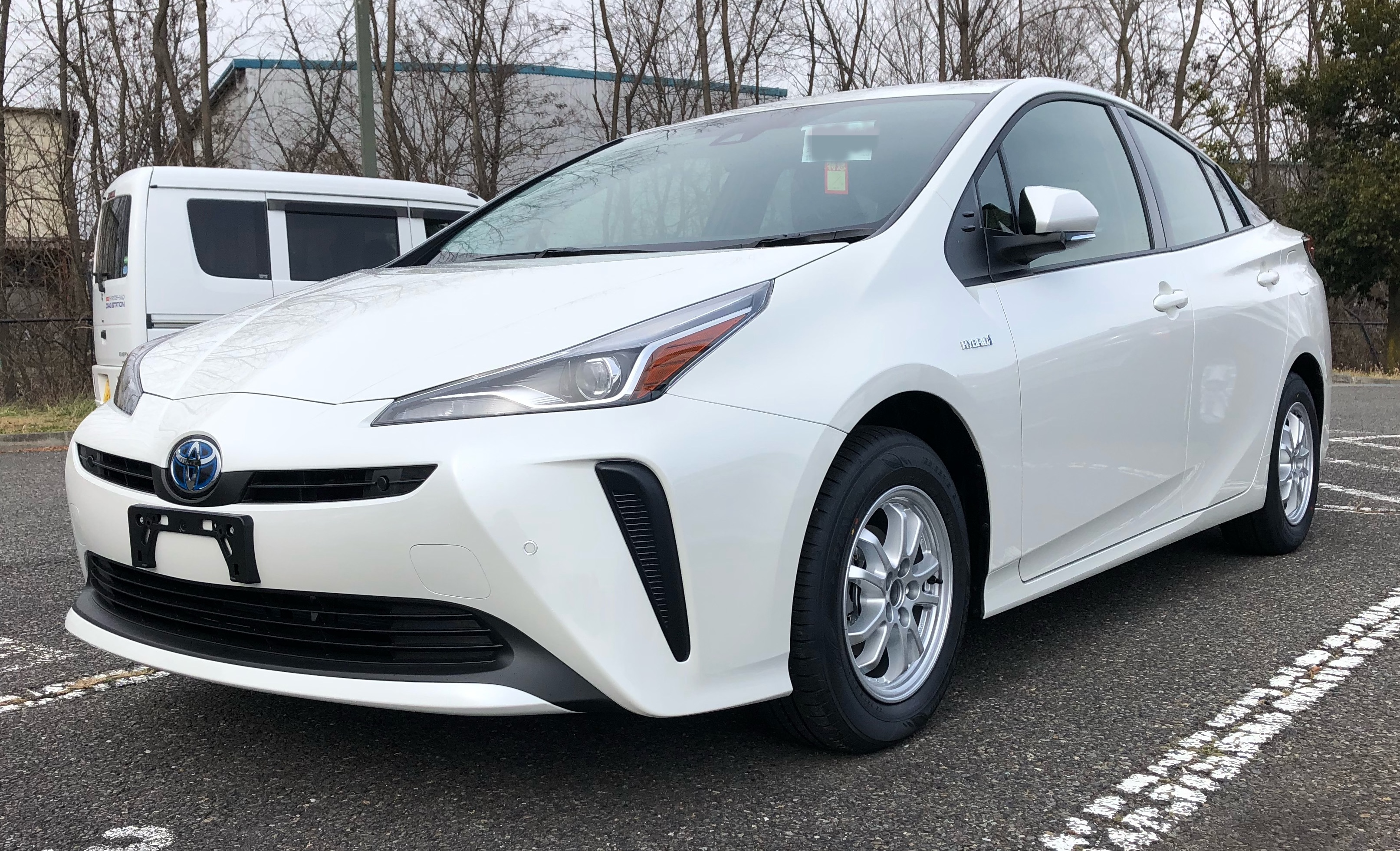 2018年12月改良型プリウスをフロントより撮影。（一部モザイク処理）